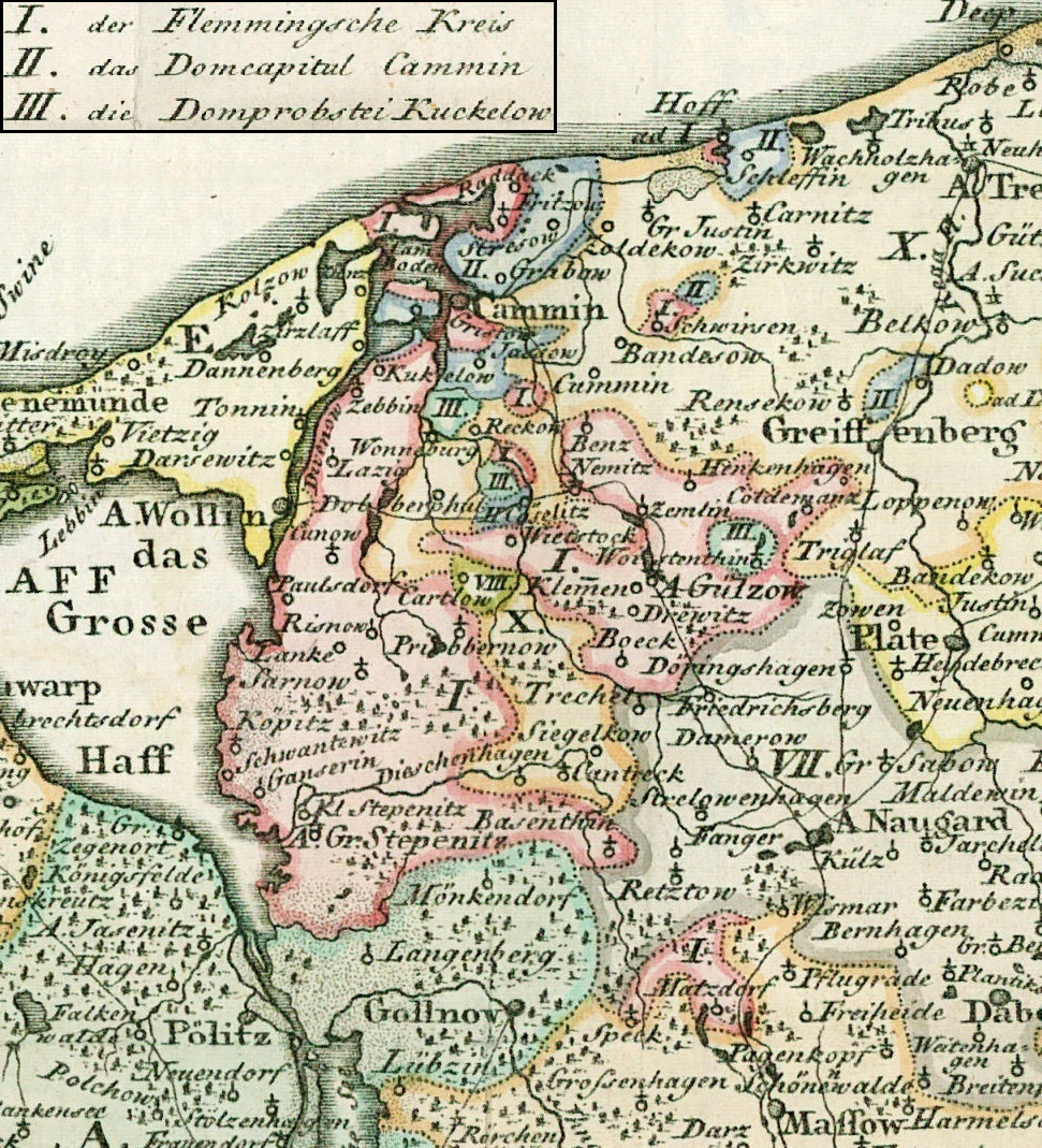 Ausschnitt aus "Landkarte des Herzogtums Vor- und Hinterpommern aus dem Jahr 1794